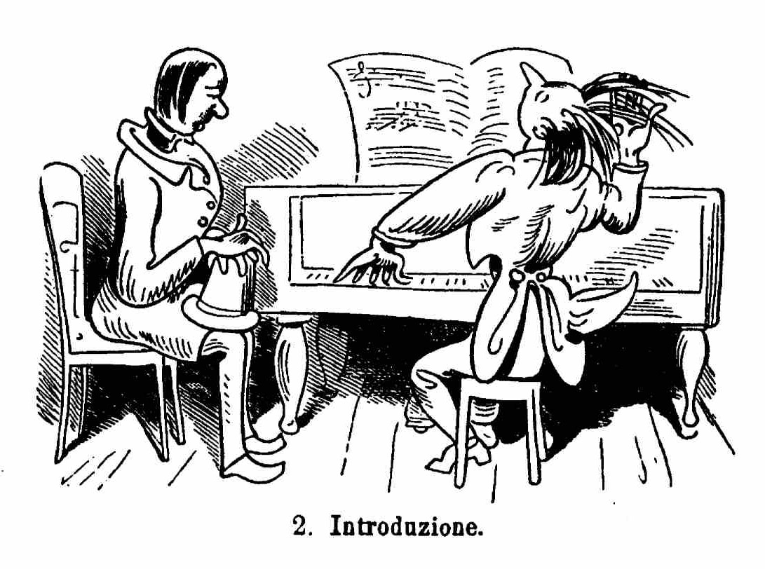 Einzelszene aus „Der Virtuos“ (Busch Gesamtausgabe in vier Bänden Band 1)